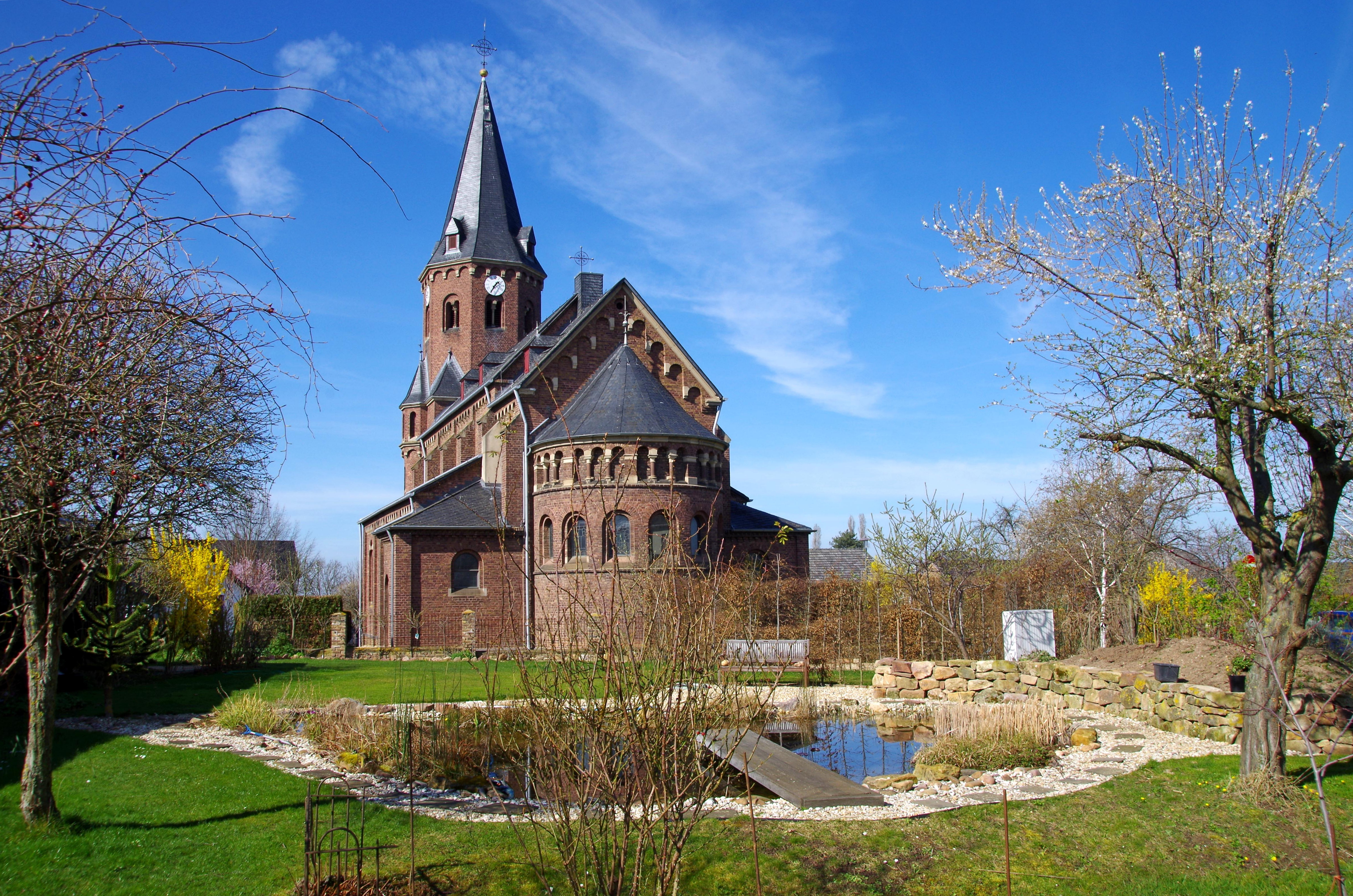 St. Kunibert (Ülpenich), Südost-Ansicht